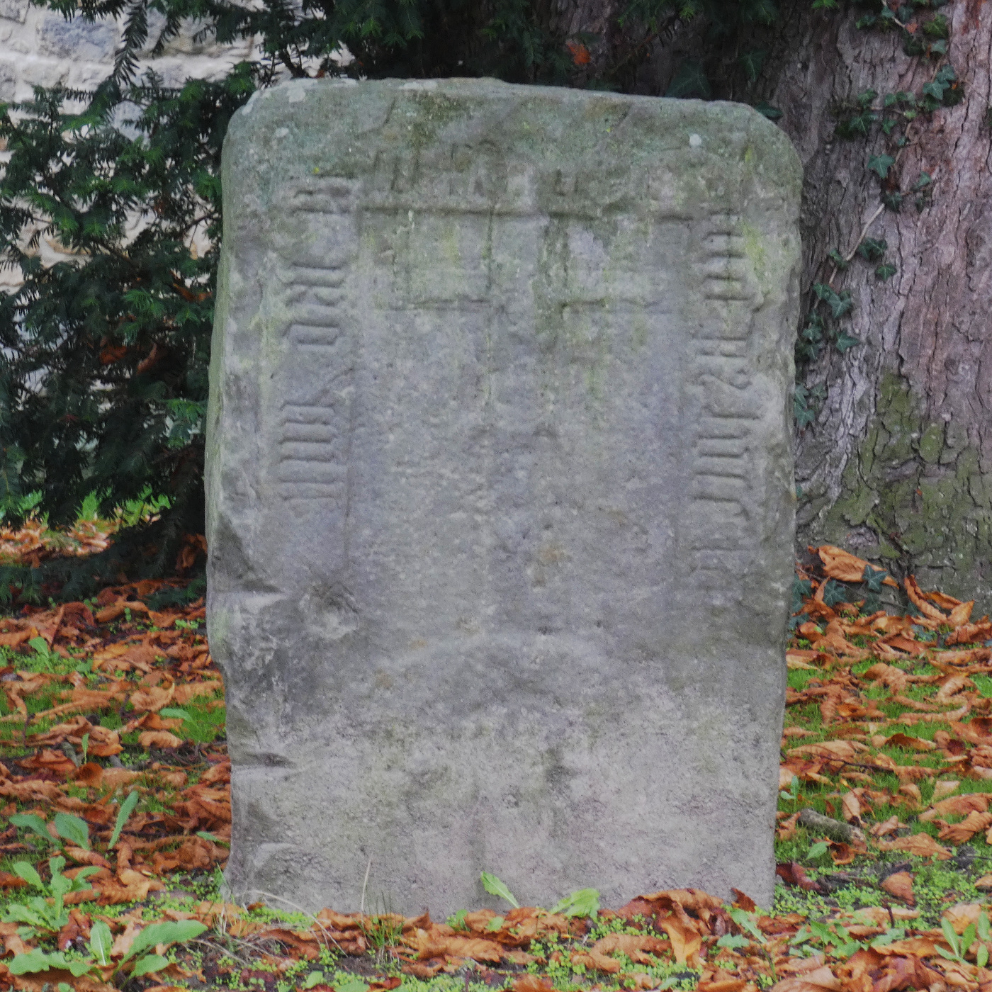 Die Kreuzsteine, oder früher die 5 Steine, sind eine Gruppe von Kreuzsteinen in Hiddestorf, einem Stadtteil von Hemmingen in der Region Hannover in Niedersachsen